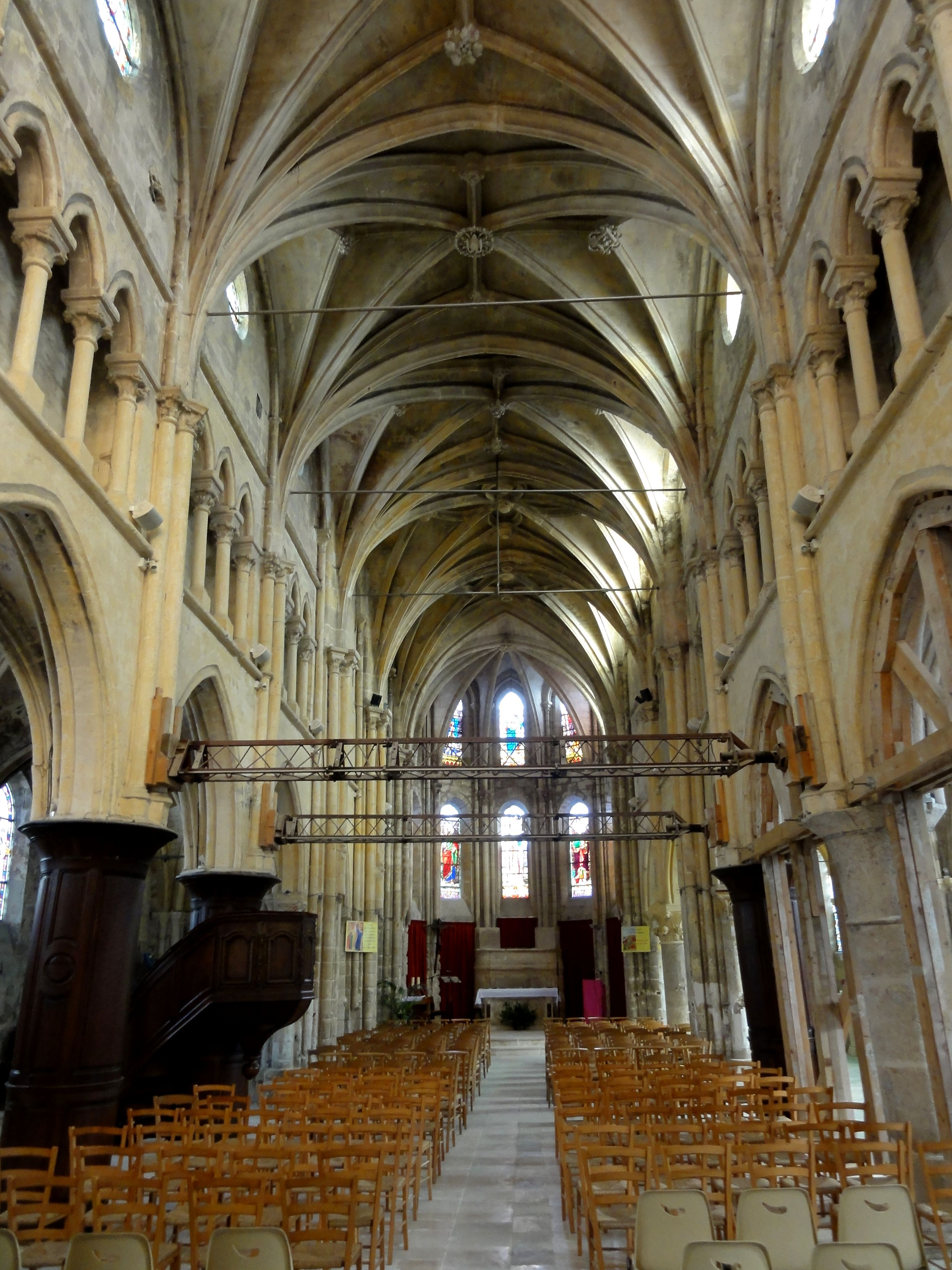 Vue générale intérieure.